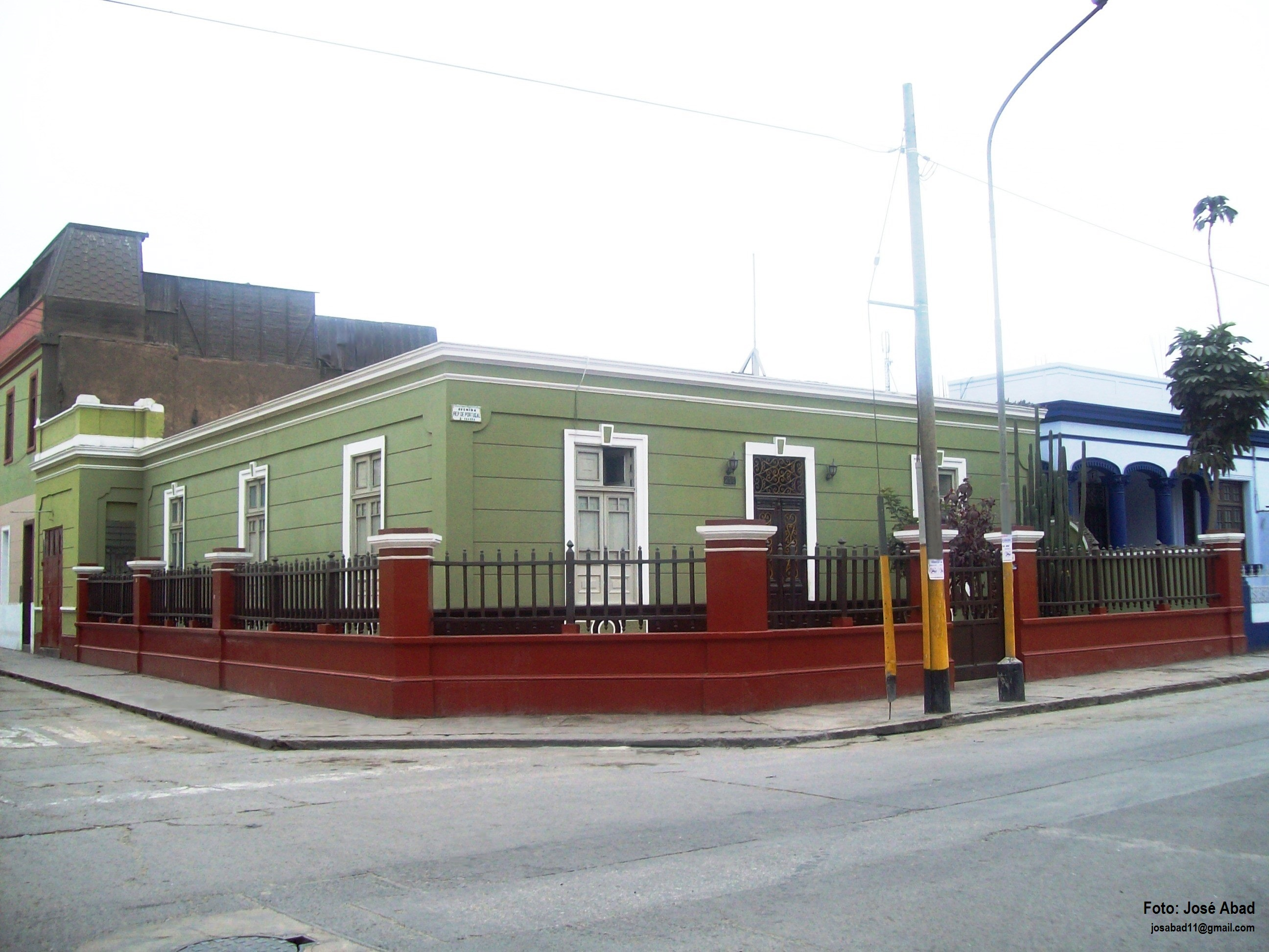 Esquina Jr. Huaraz y Av. Rep. de Portugal, en Breña.